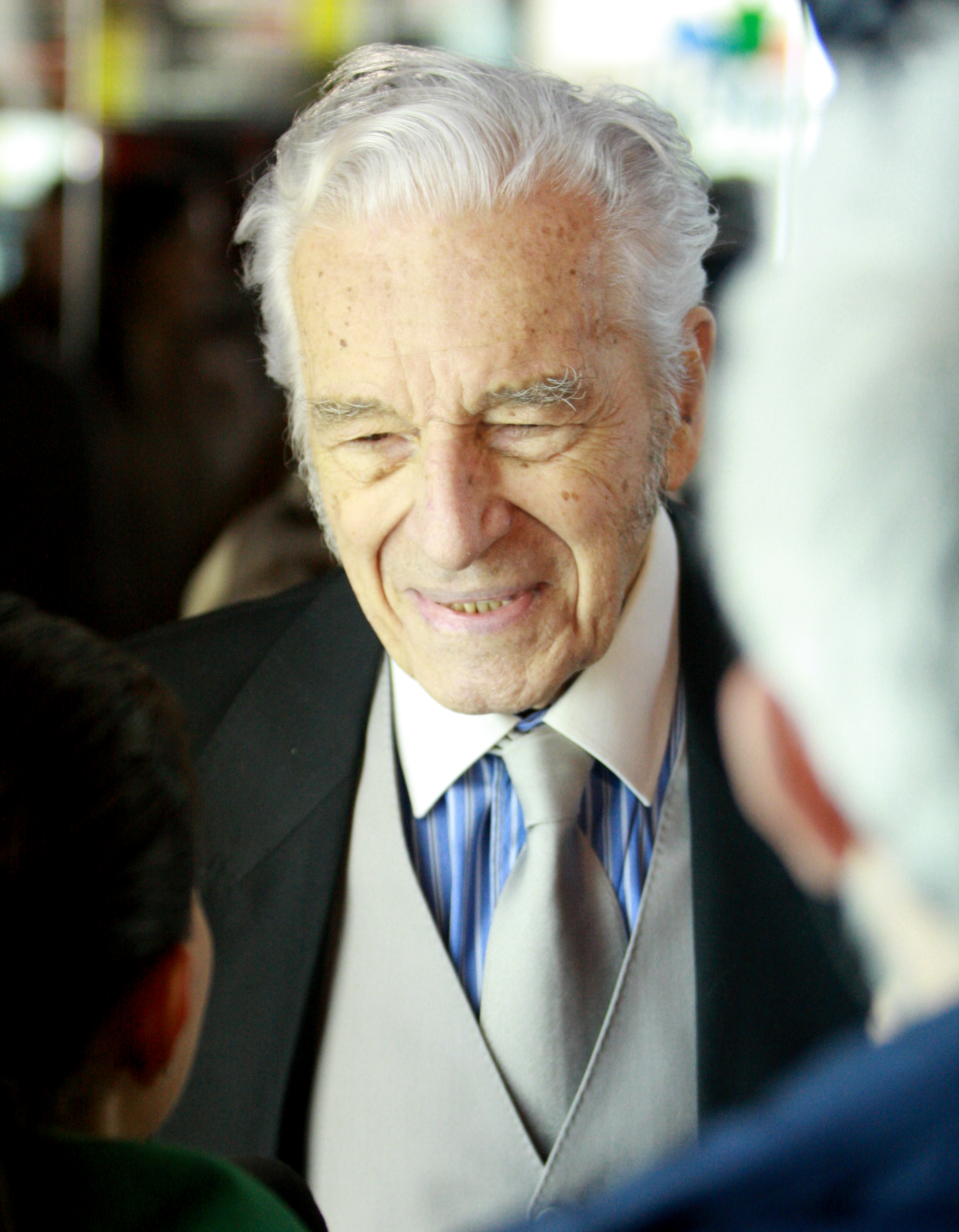 premiera Ultimul Corupt din Romania